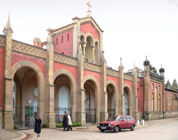 Torhaus Friedhof Engesohnde in Hannover